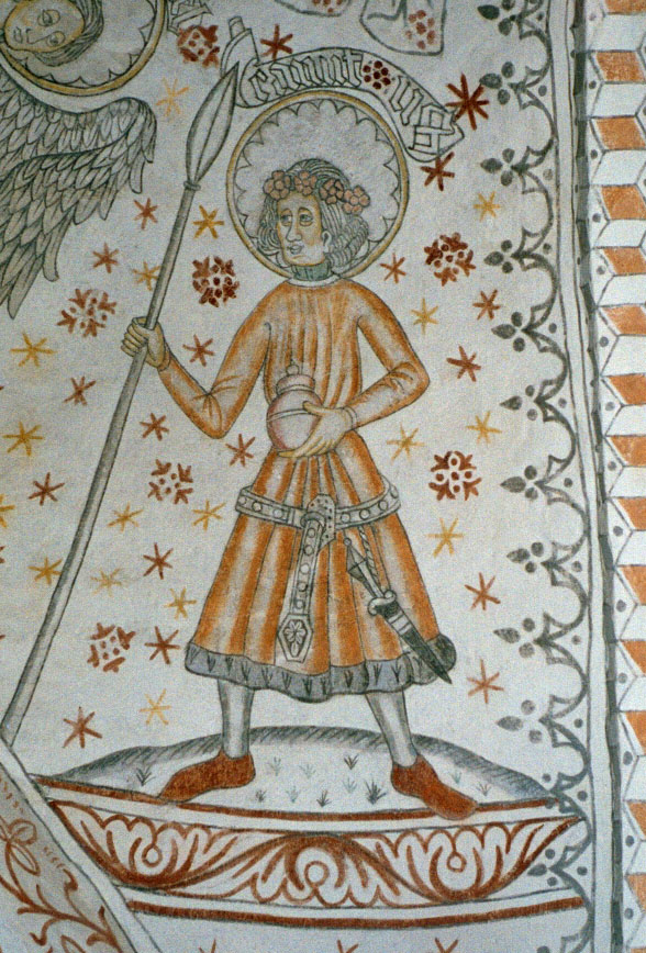 Pintura medieval en piedra de Canuto Lavard en la Iglesia de Vigersted, en las afueras de Ringsted, Dinamarca. Knud (Canute) Lavard (died 1131), Danish prince and saint. Medieval painting in the church of Vigersted, Denmark. Photographer: Fredrik Tersmeden, Lund, Sweden (2002)